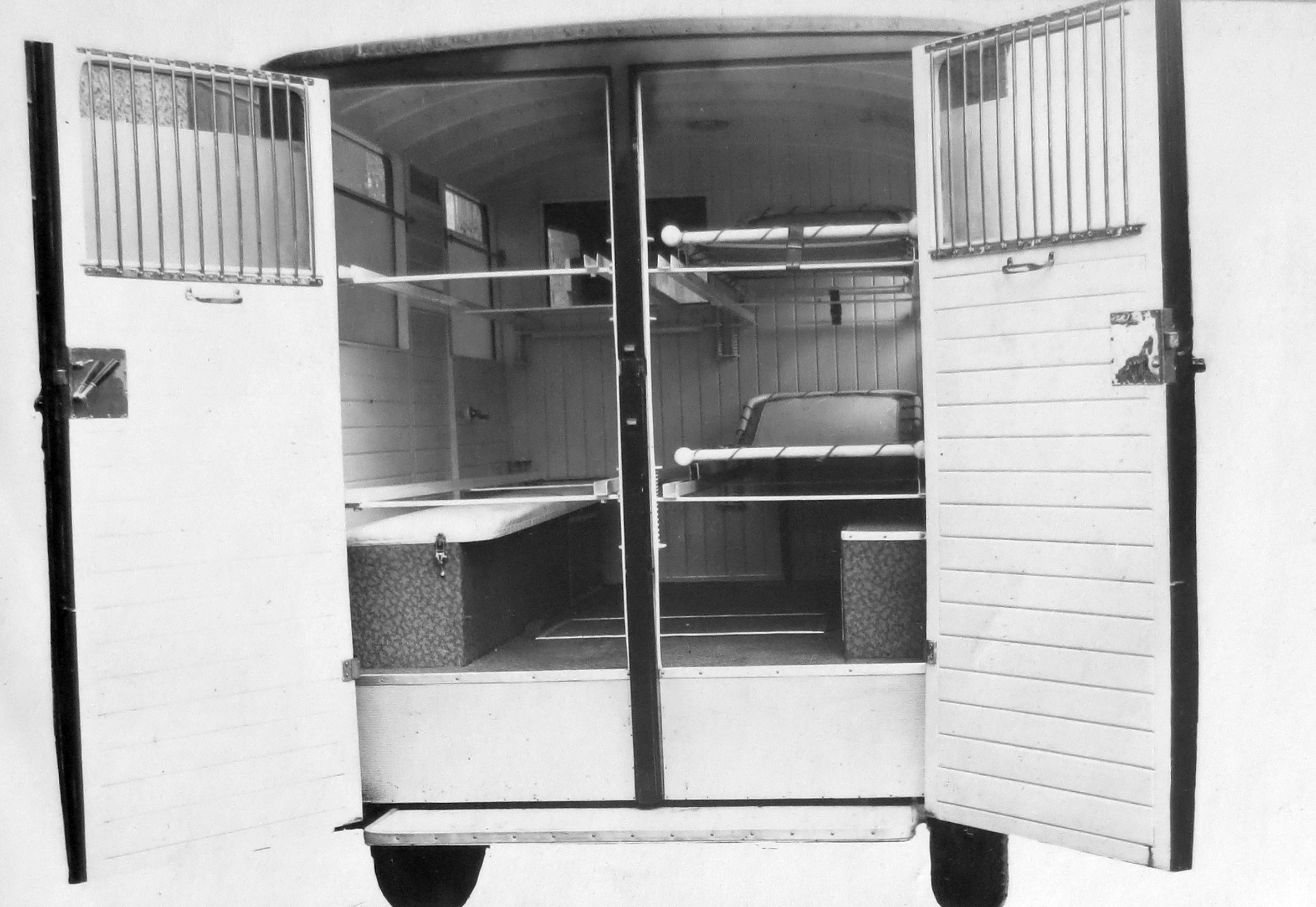 Walter Comercial sanitka (1932)